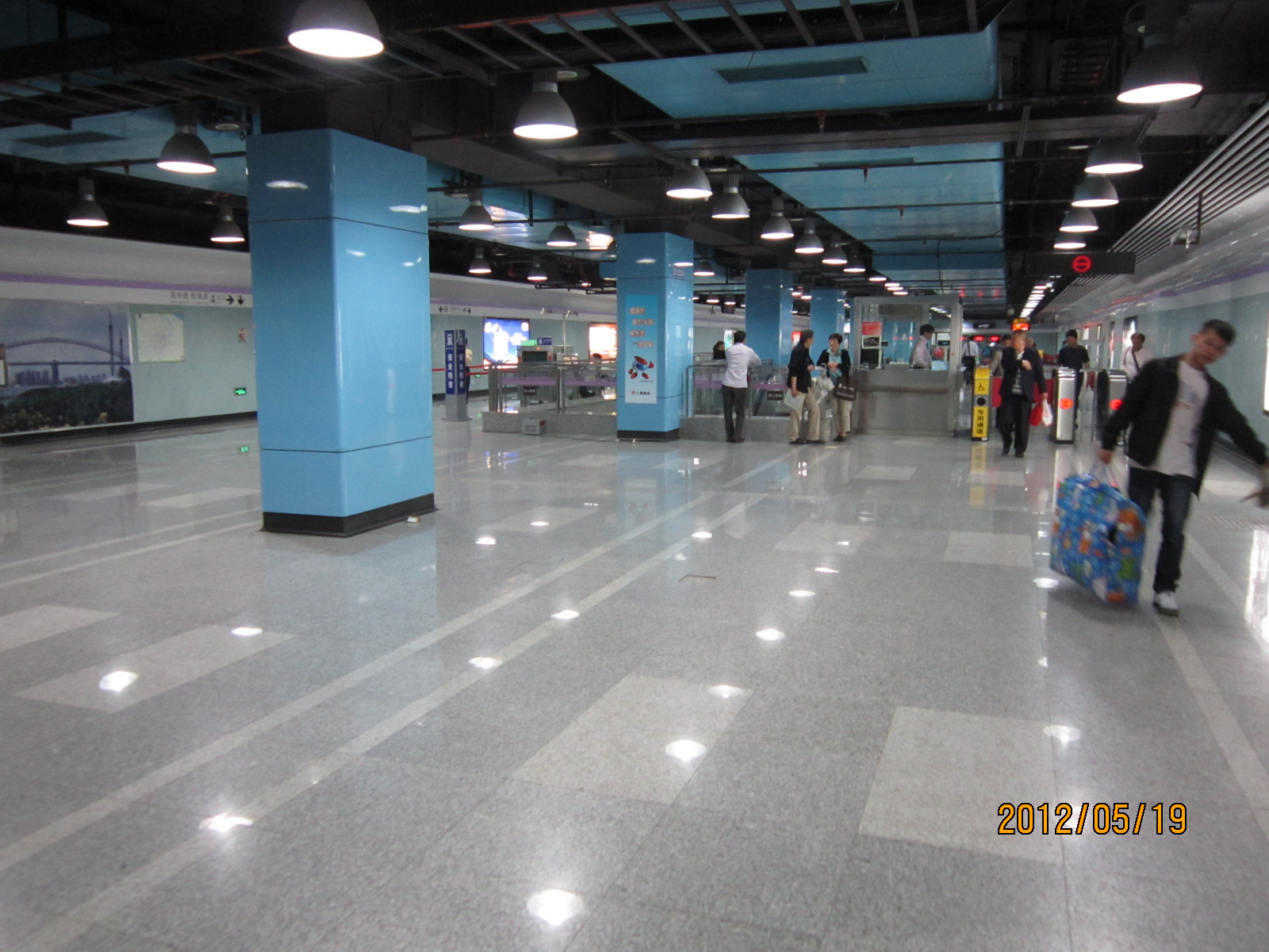 上海轨道交通10号线航中路站站厅